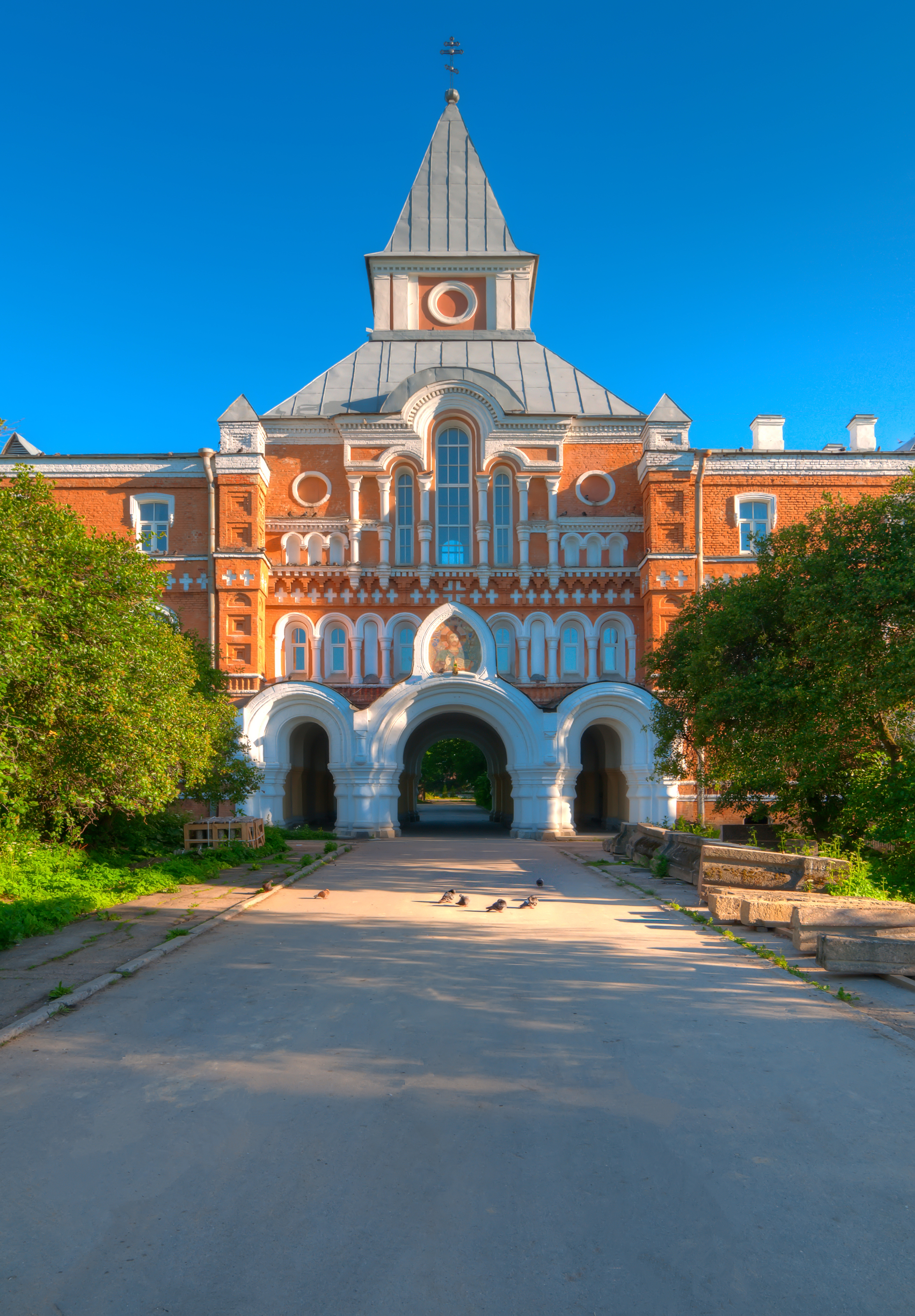 Корпус братский с церковью святого Саввы Стратилата. Санкт-Петербург. Свято-Троицкая Сергиева-Приморская мужская пустынь